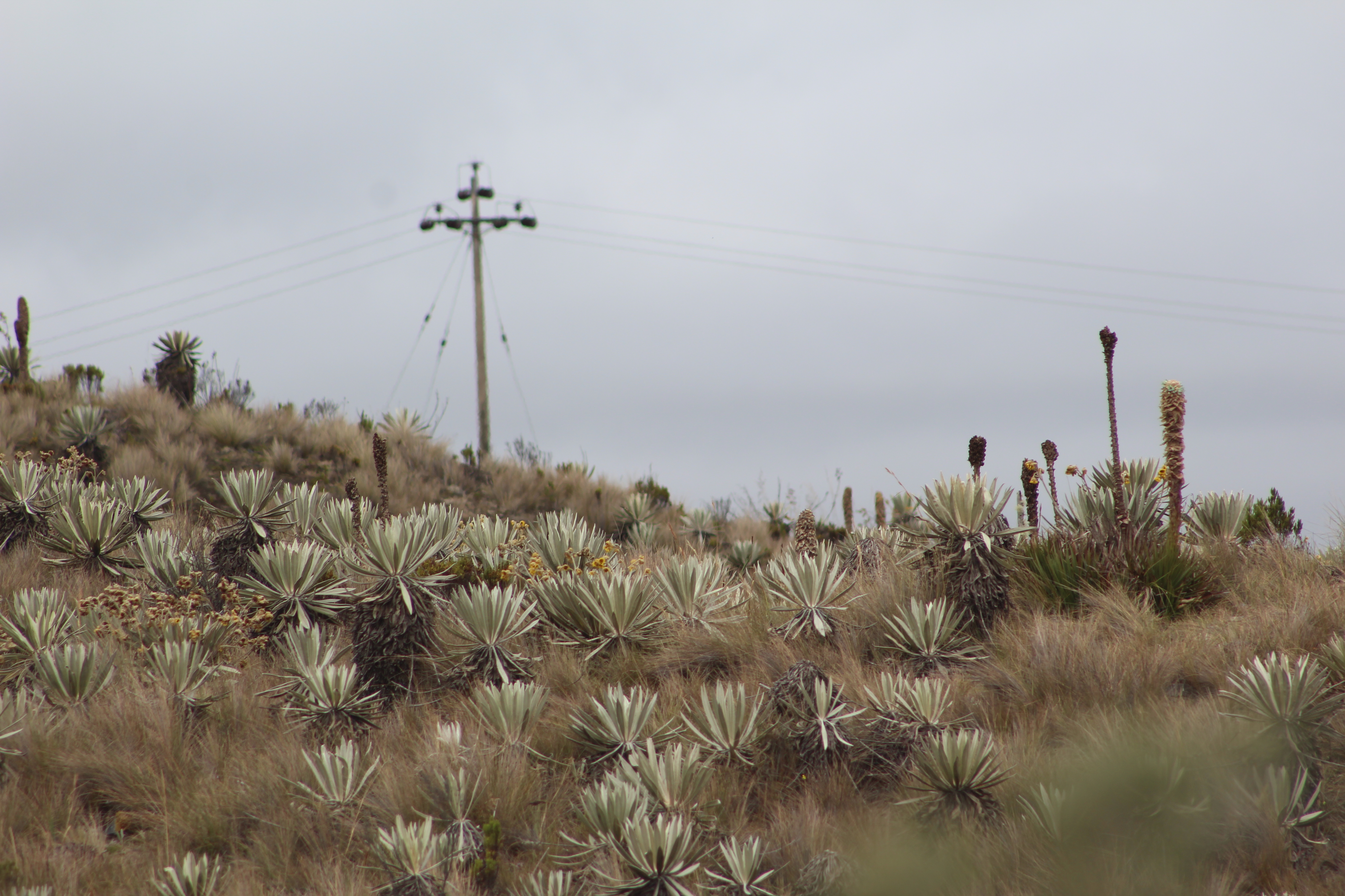 Esta fotografía fue tomada en un área protegida de Colombia con el código 11001 del RUNAP.